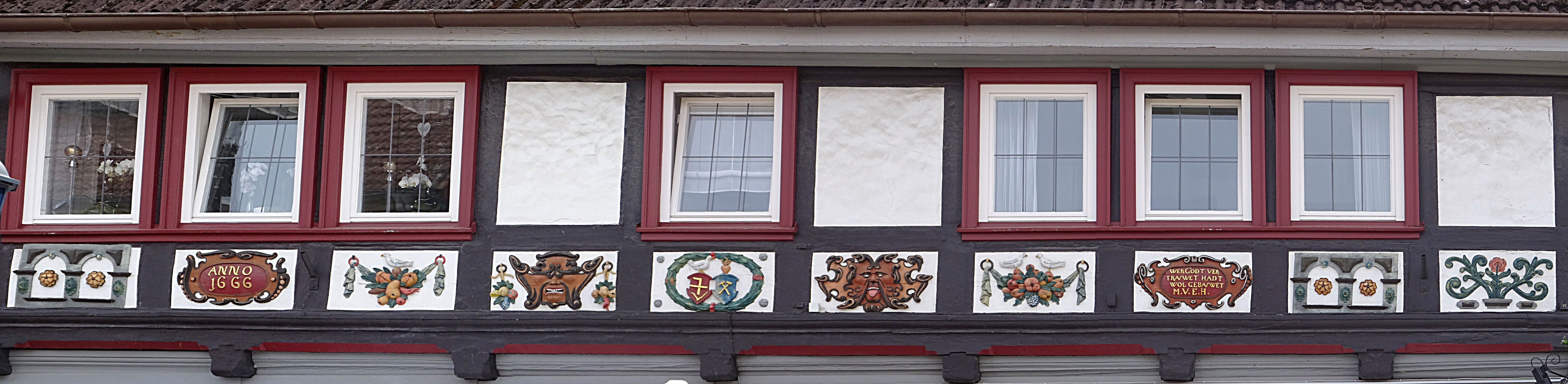 Fachwerkhaus Am Markt 28 in Herzberg (Harz)